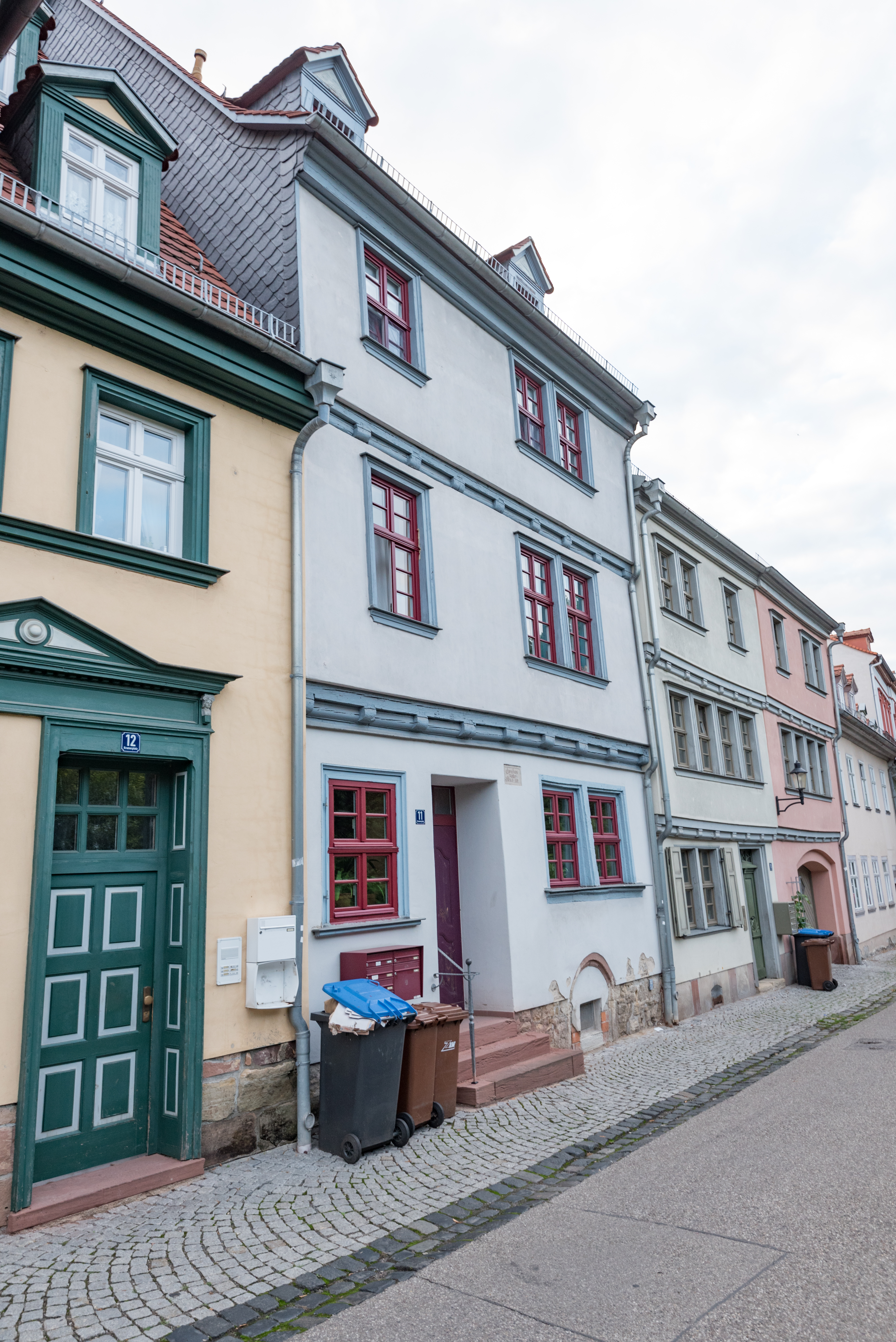 Naumburg (Saale), Kramerplatz 11